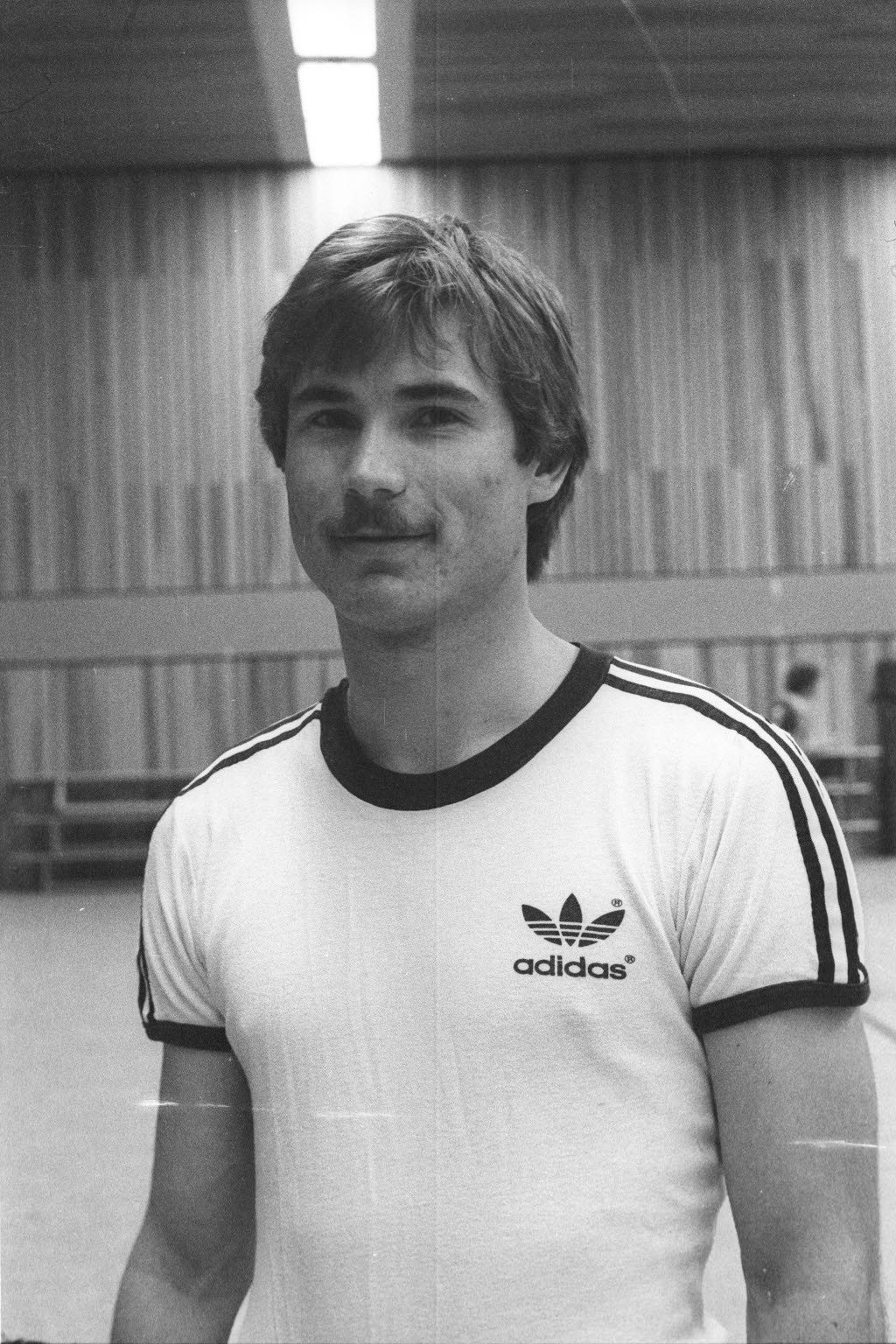 Handballspieler der Bundesligamannschaft des Turnverein Hassee-Winterbek (THW Kiel).